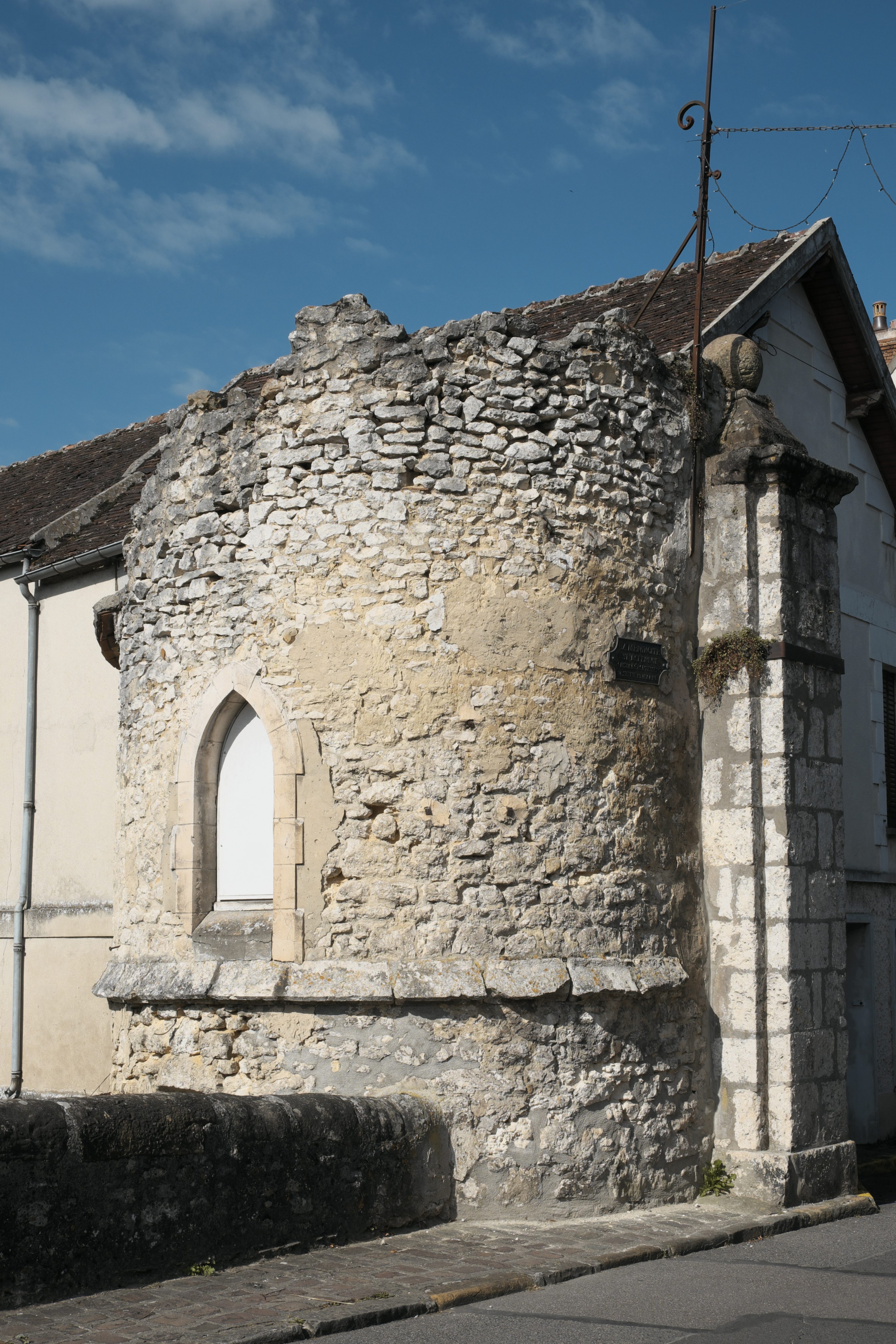 Reste der Stadtbefestigung in Donnemarie-Dontilly im Département Seine-et-Marne (Île-de-France/Frankreich)